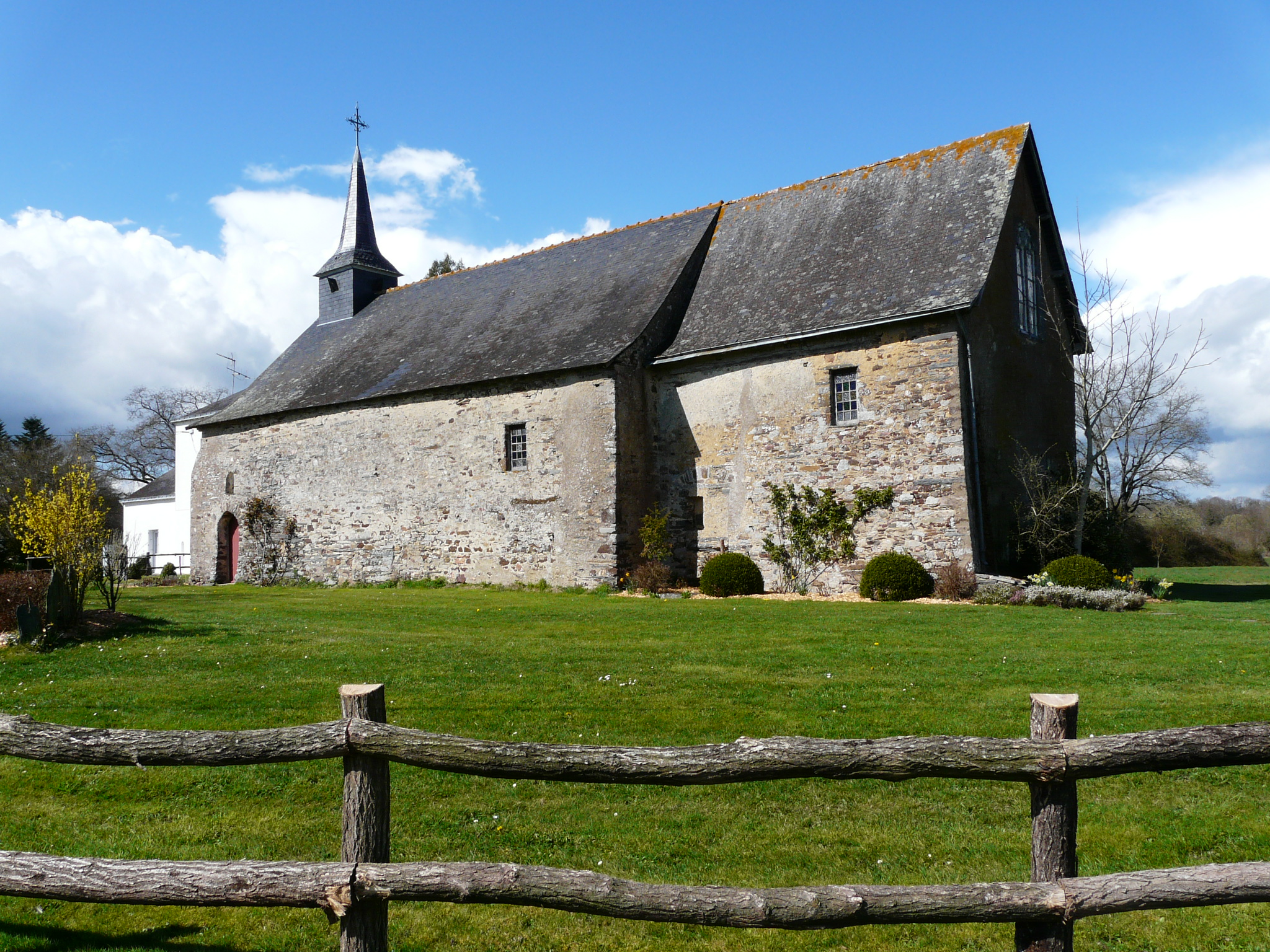 Vue d'ensemble de la Chapelle St Germain (Angle Sud-Est)